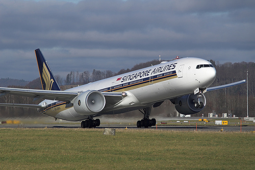 Singapore Airlines Boeing 777-300 9V-SWA